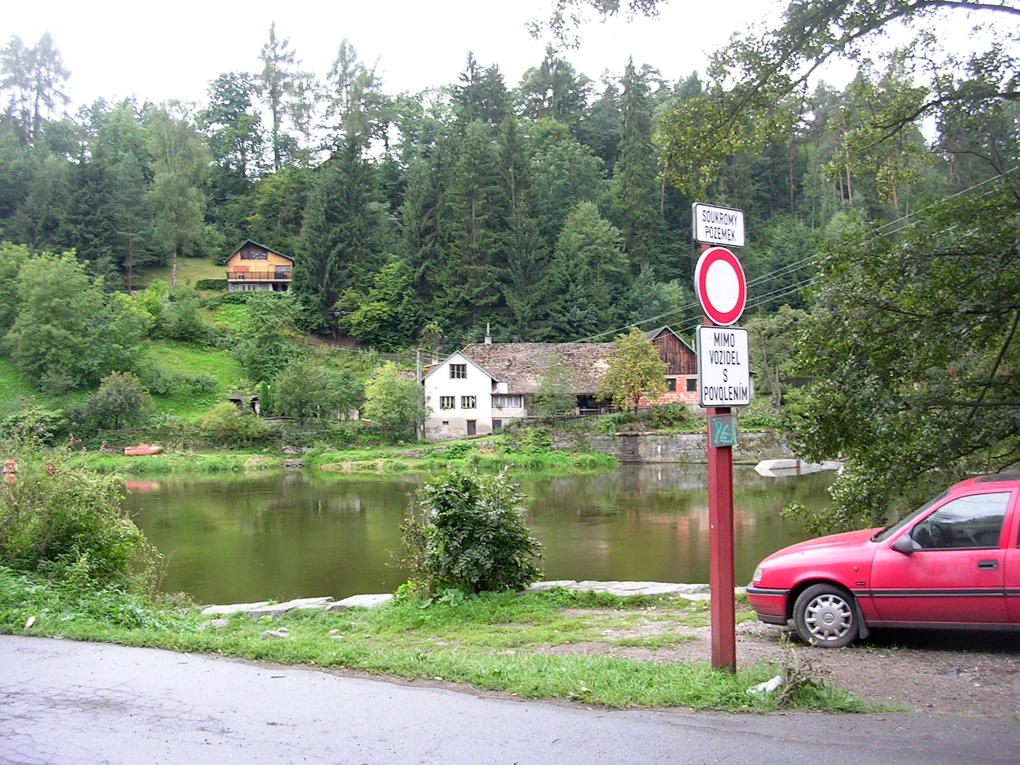 Bývalý přívoz, Žampach, řeka Sázava, Česká republika